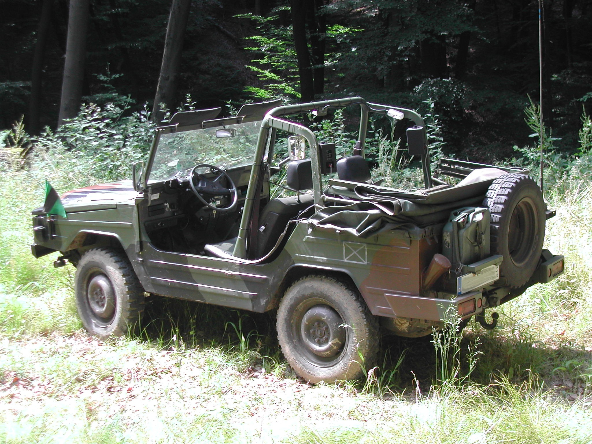 Volkswagen Iltis in Bundeswehr-Flecktarnlackierung, Verdeck offen.